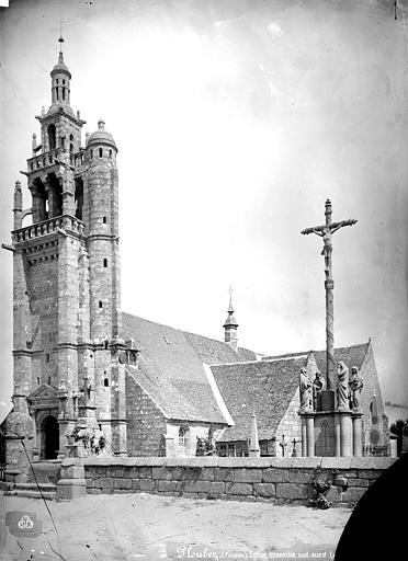 L'église Saint-Pierre de Ploubezre, photographiée par Séraphin-Médéric Mieusement. .